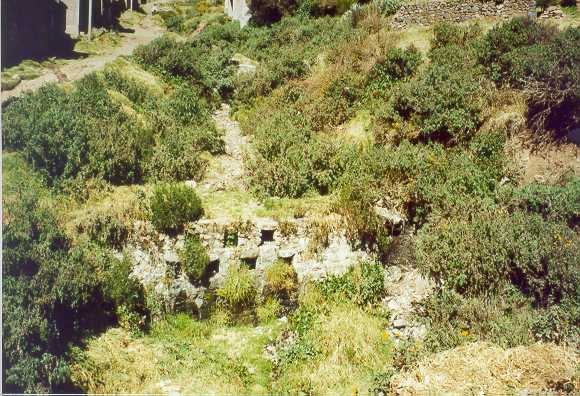 Presa filtrante en la ladera de los cerros circundantes a PUNO - Perú